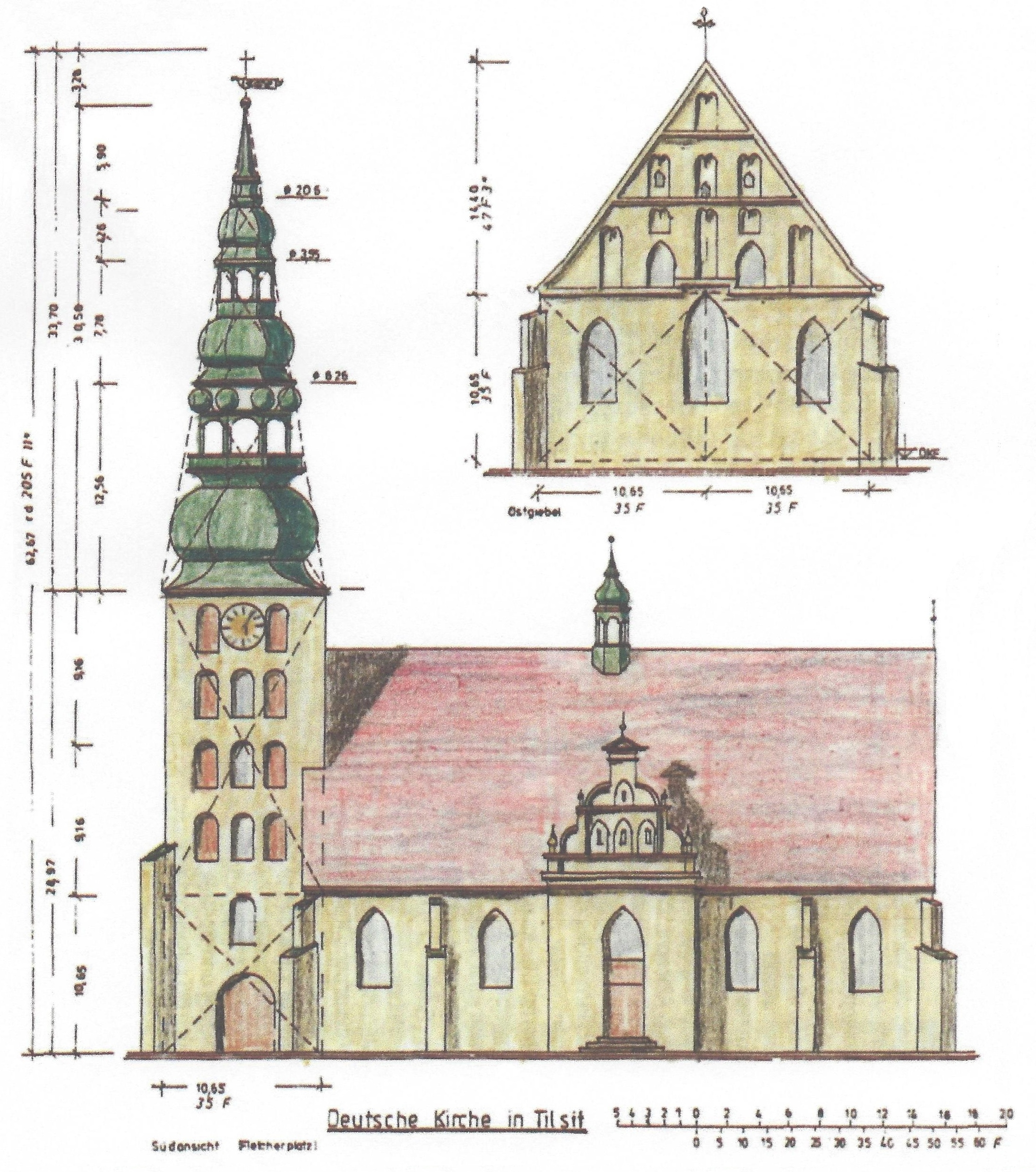 Front- und Seitenriss der Deutschen Kirche in Tilsit